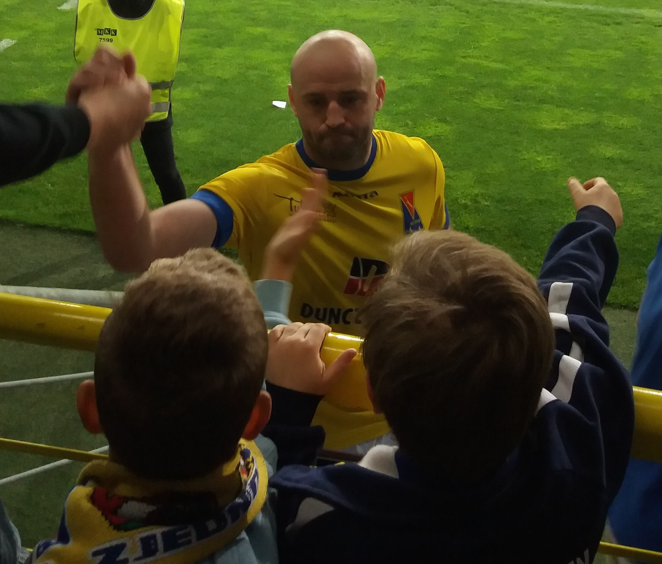 Kamil Oziemczuk - Motor Lublin (2018)